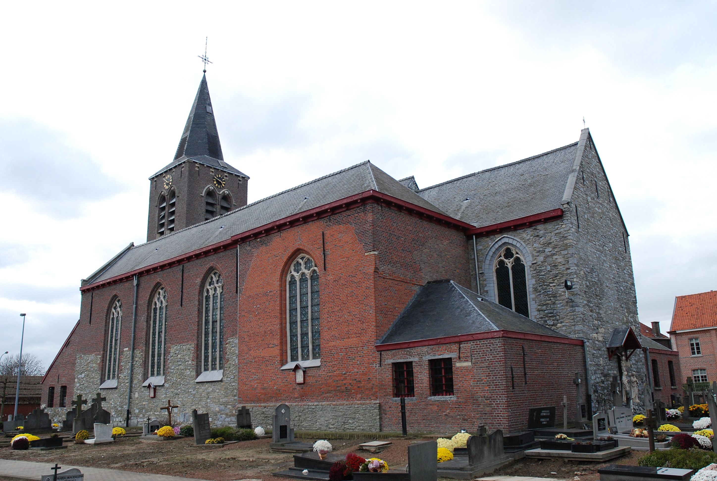 de Bartolomeuskerk te Vinkt, België